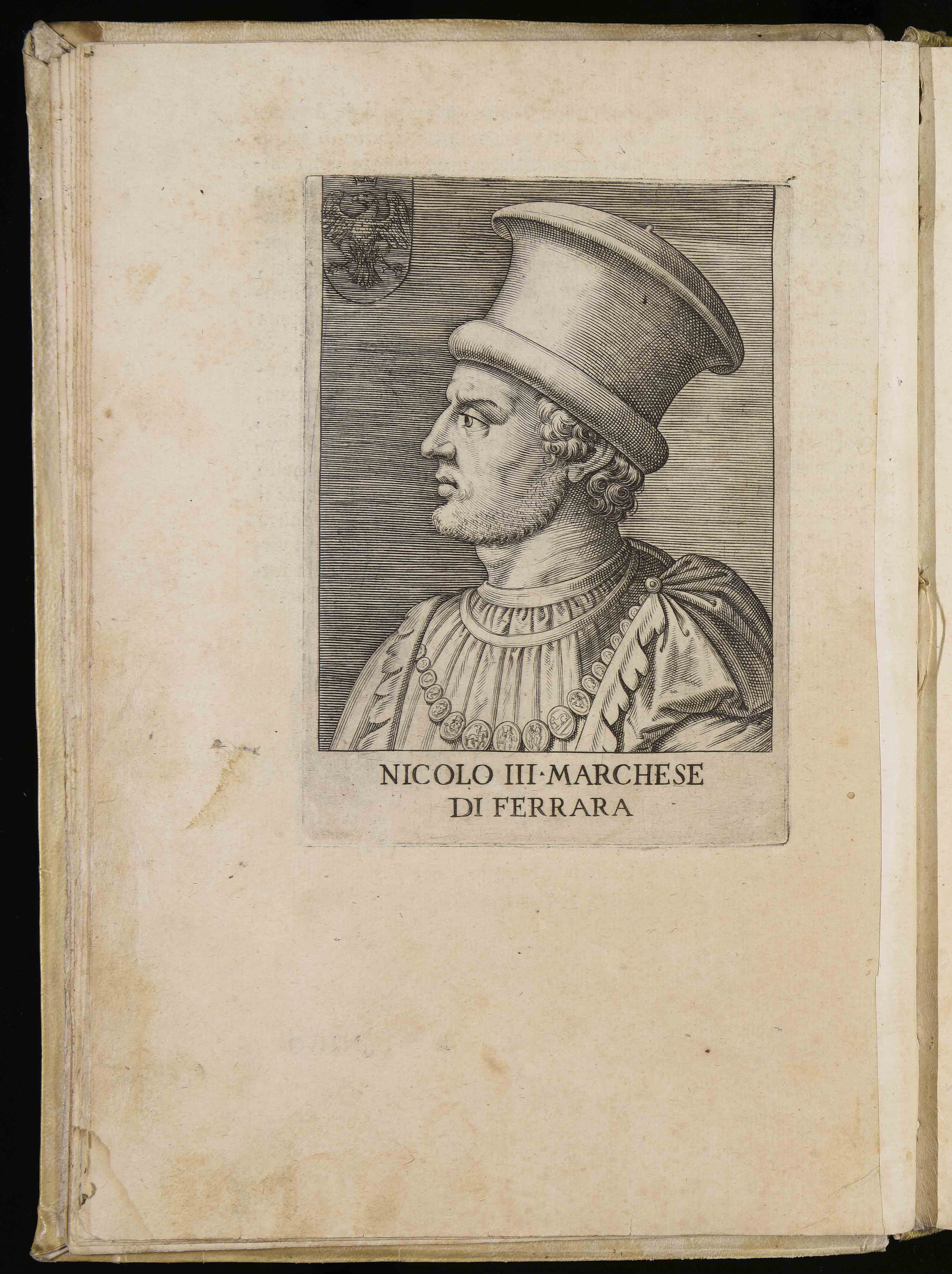 Calcografia in Aliprando Caprioli, Philippe Thomassin & Jean Turpin, in Aliprando Caprioli, Philippe Thomassin & Jean Turpin, Ritratti di cento capitani illustri con li lor fatti in guerra, Roma, Domenico Gigliotti/Philippe Thomassin & Jean Turpin, 1596/1600.